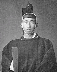 装束姿の朝香宮孚彦王